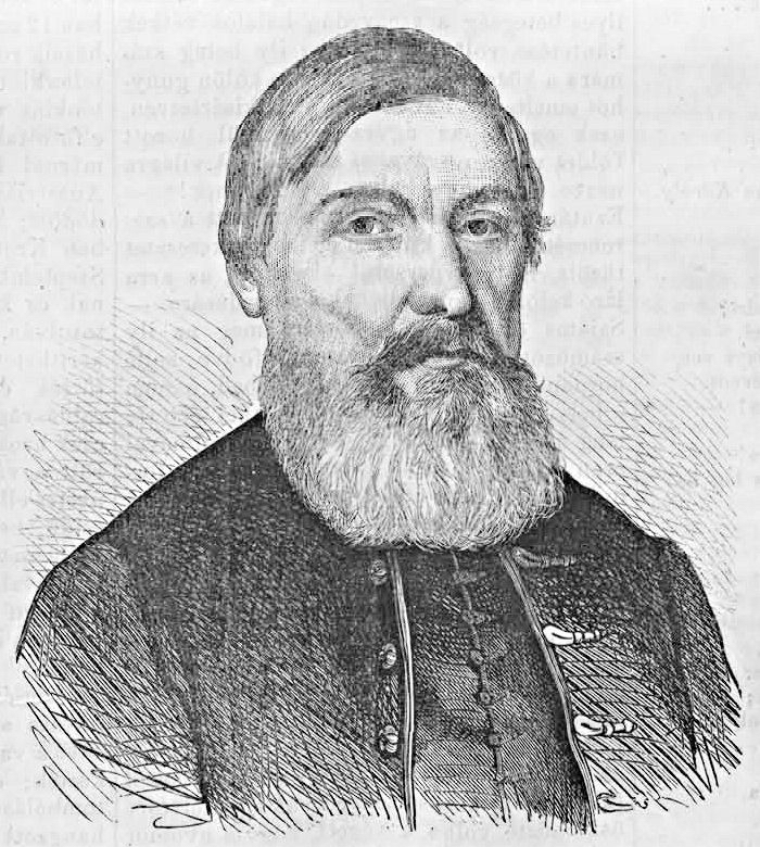 Zádor György (1799–1866) író, irodalomtörténész, ügyvéd, az MTA rendes tagja (Vasárnapi Ujság, 1866. augusztus 26.)